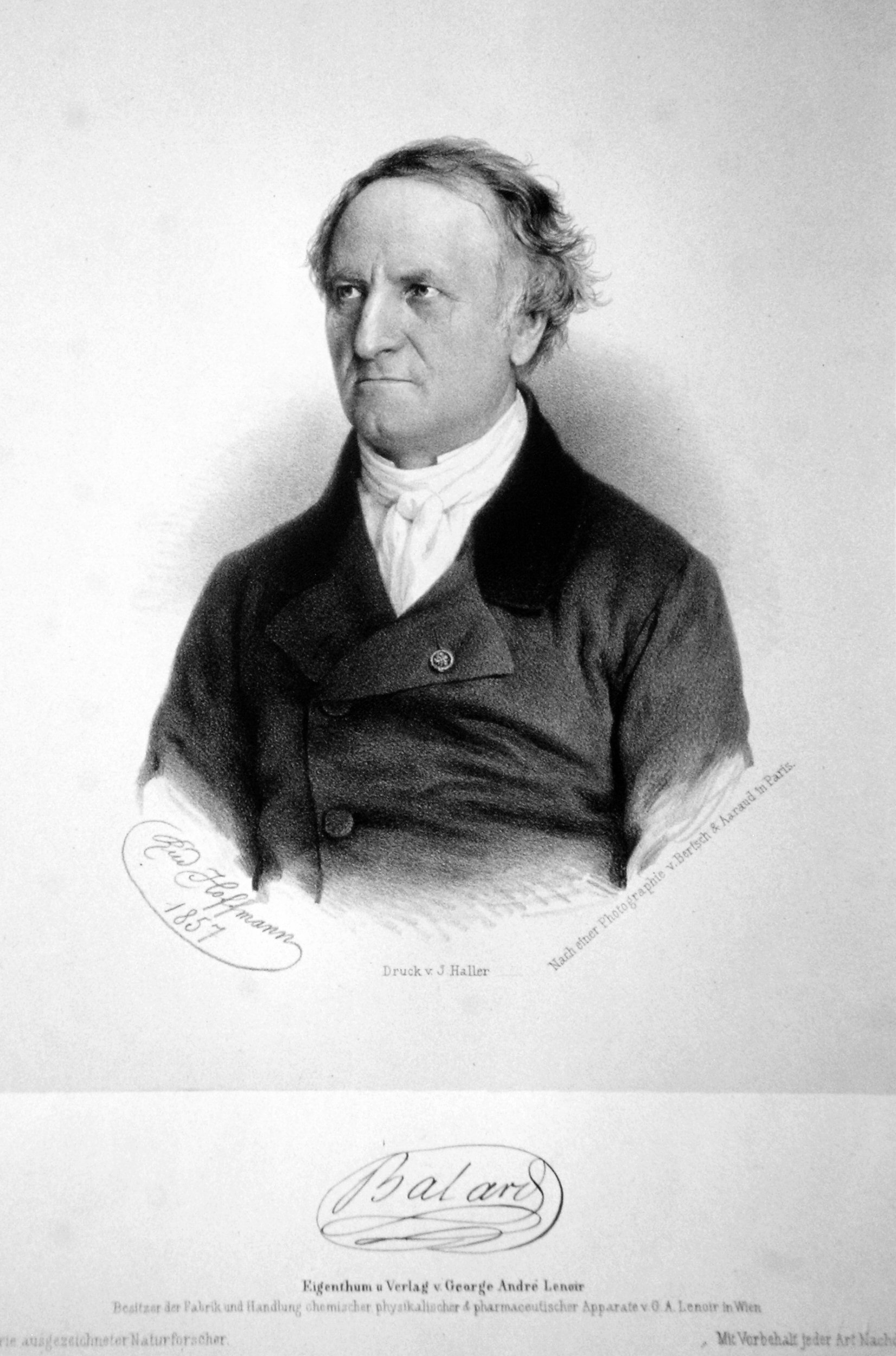 Antoine-Jérôme Balard, (1802-1876), französischer Chemiker. Lithographie von Rudolf Hoffmann, 1857. Nach einer Photographie von Bertsch & Arnaud